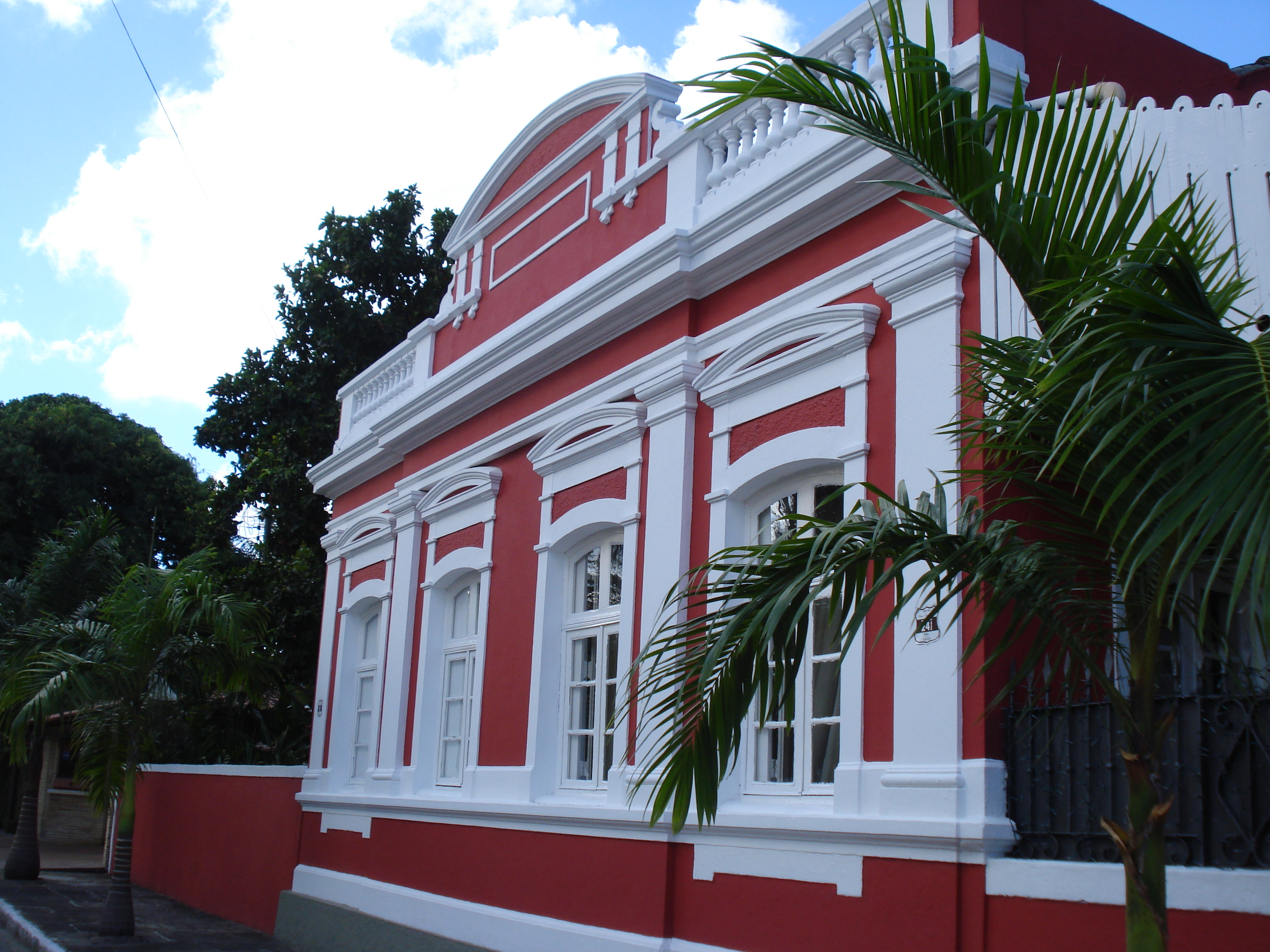 Casarão do poço da Panela.